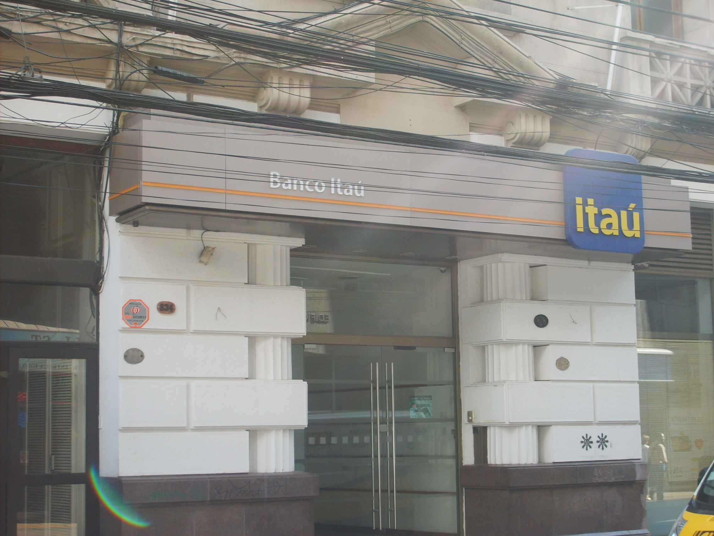 Sucursal del Banco Itau en Valparaiso ,Chile